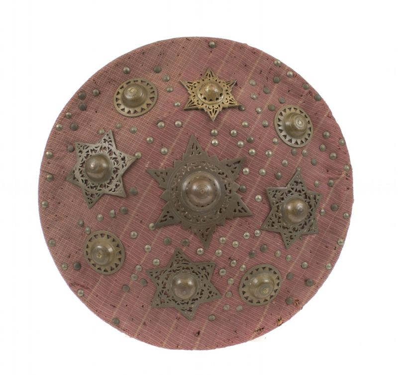 Schild. Rotan schild met katoen overtrokken Unknown language: Peurise